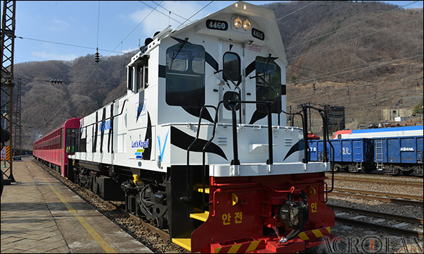 백두대간협곡열차의 기관차